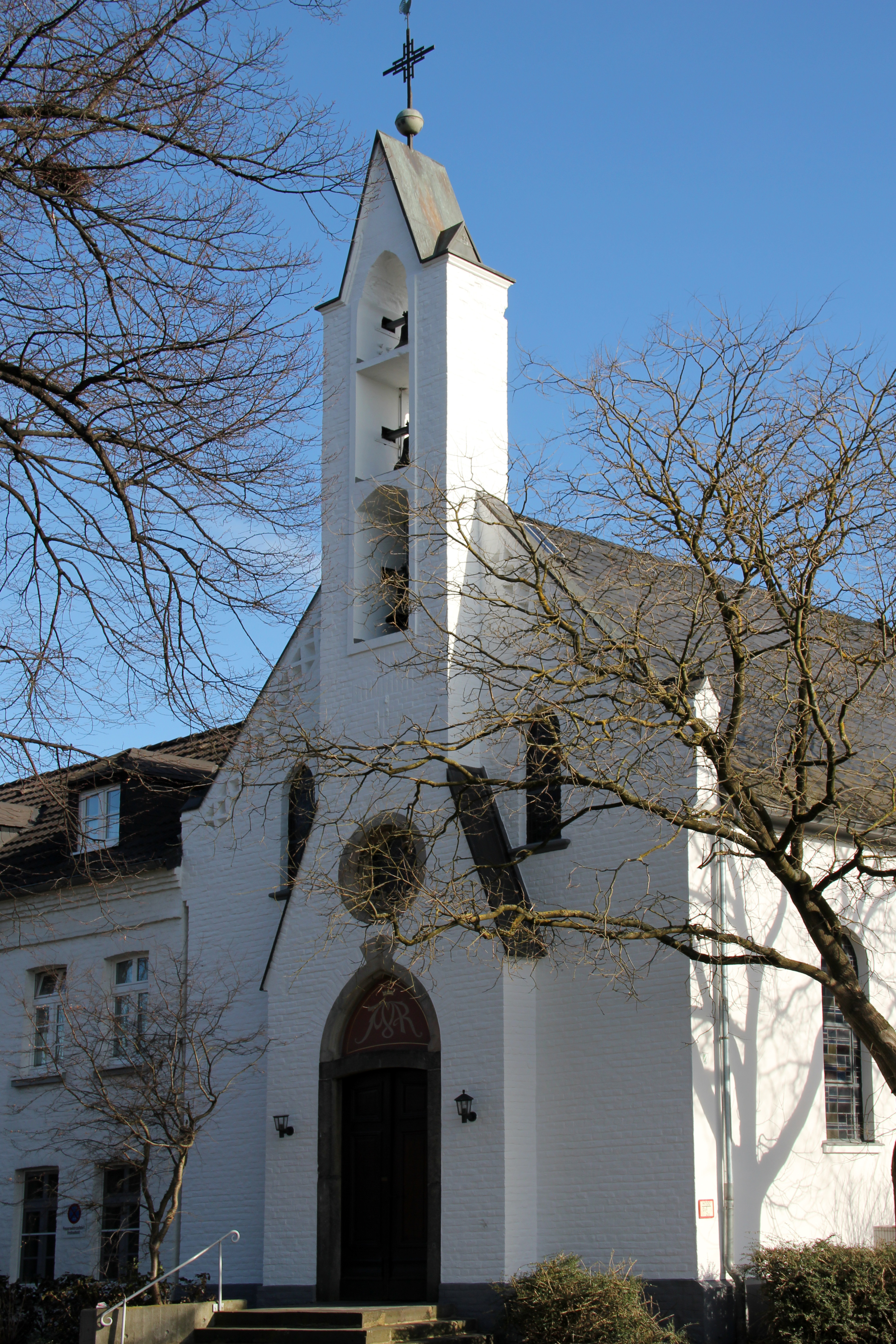 Marienkapelle Frauenthal, Südwestseite